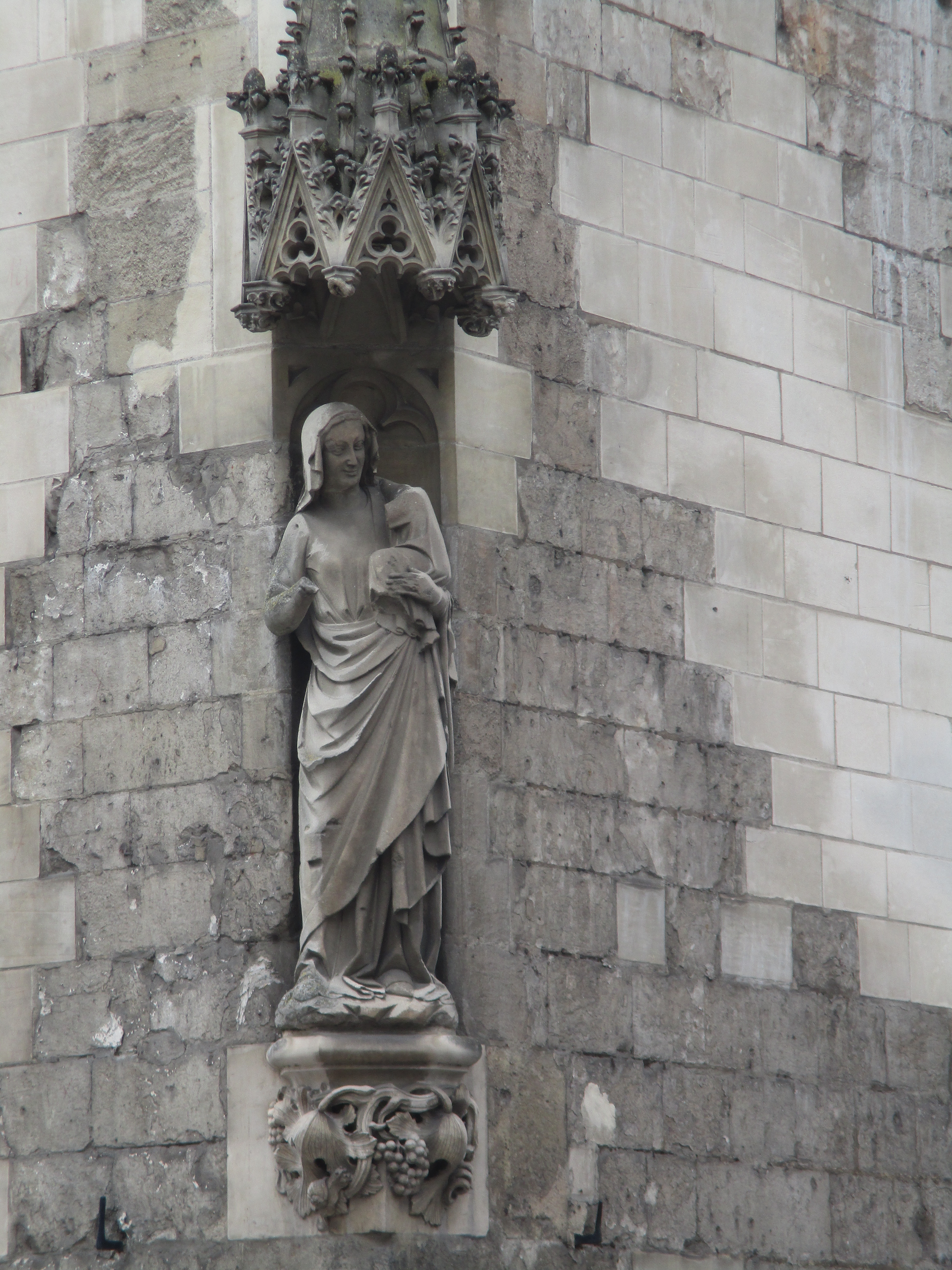 Vierge à l'Enfant du beffroi d'Amiens.